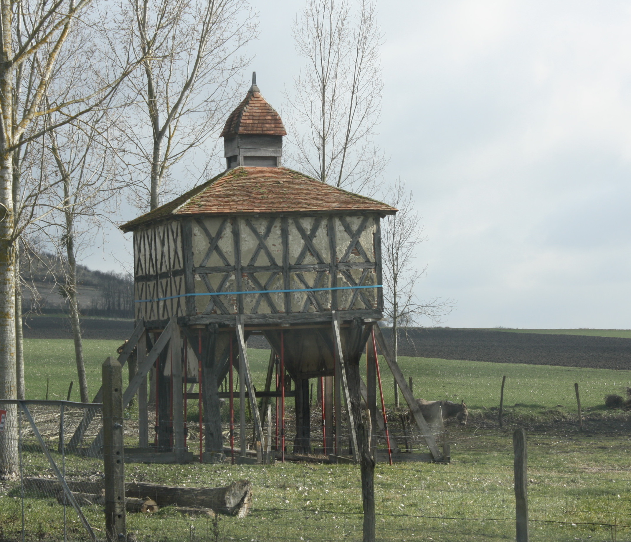 Rue des pigeonniers